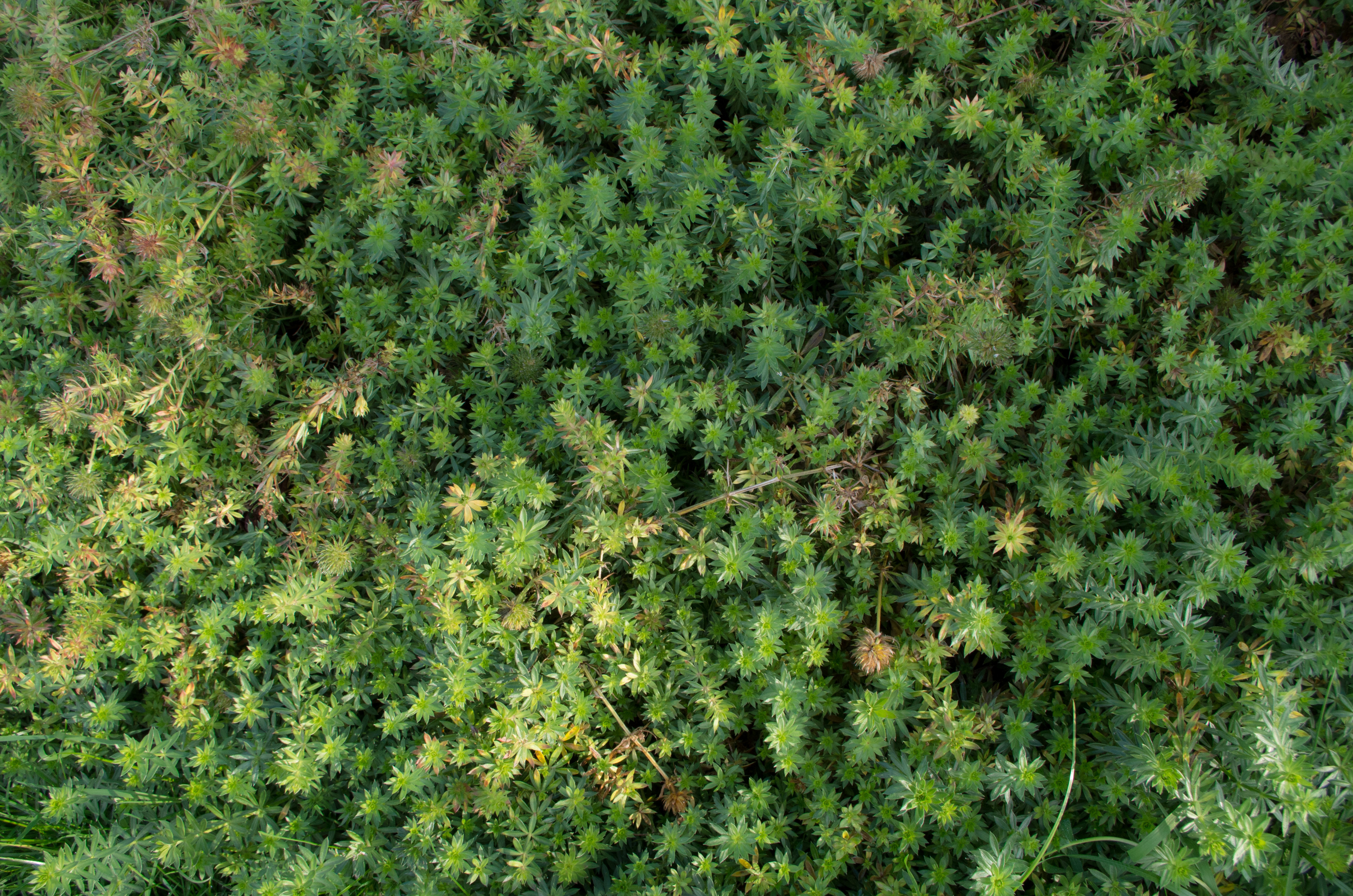 Phuopsis stylosa - Parc Floral